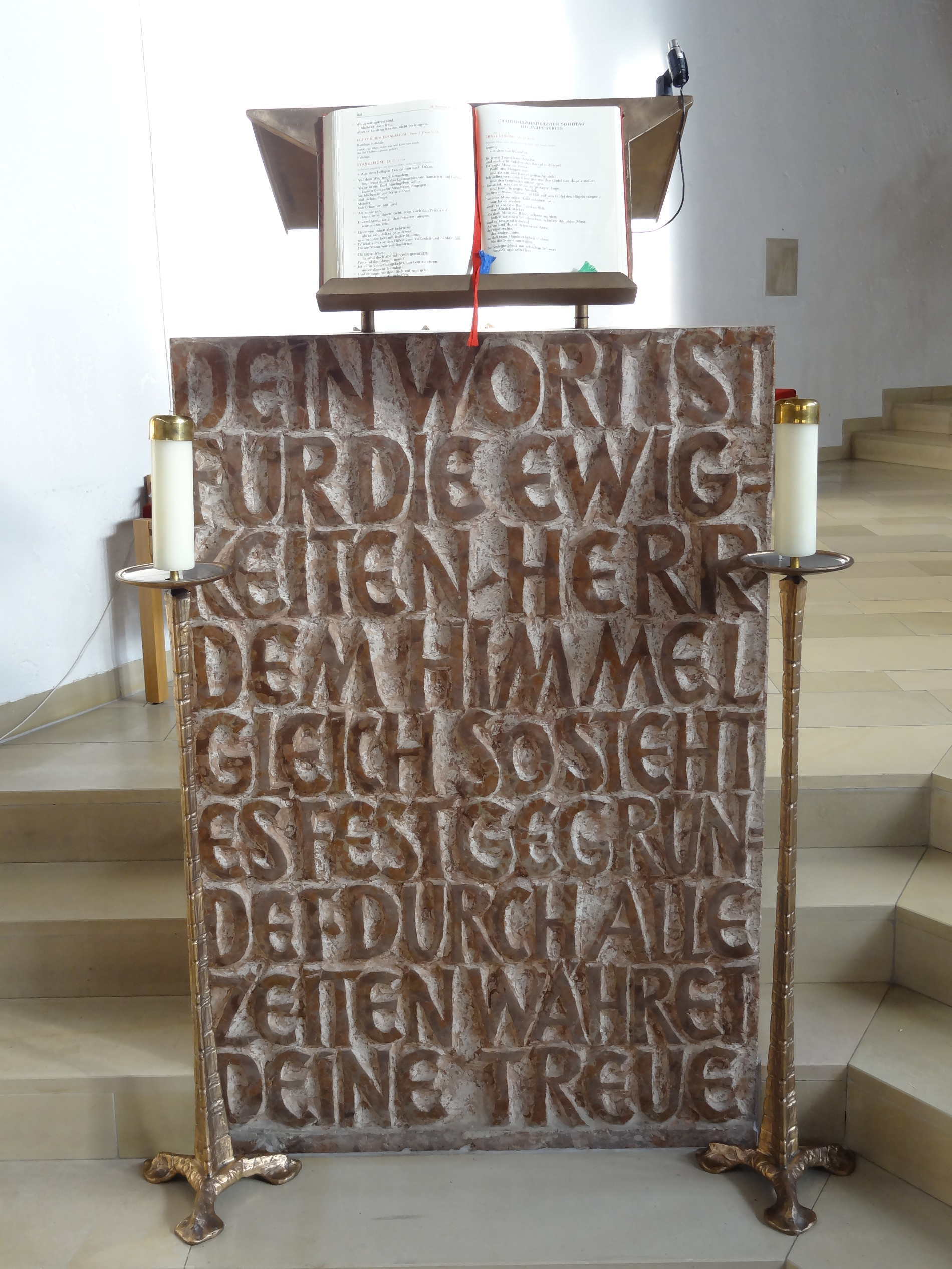 Ambo der Pfarrkirche St. Josef in Niederaichbach (Lkr. Landshut, Bayern)